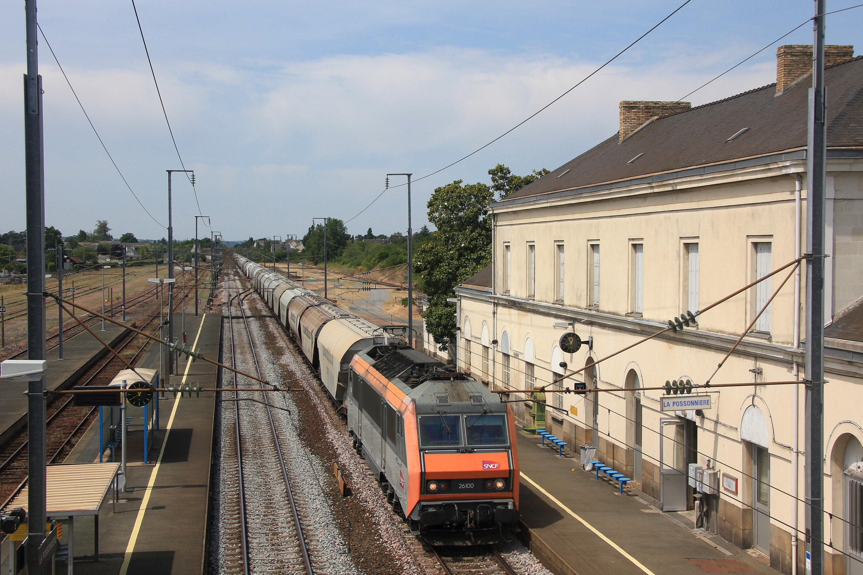 Un train de fret complet de céréales tiré par la BB 26100 franchit la gare de La Possonnière, entre Nantes et Angers